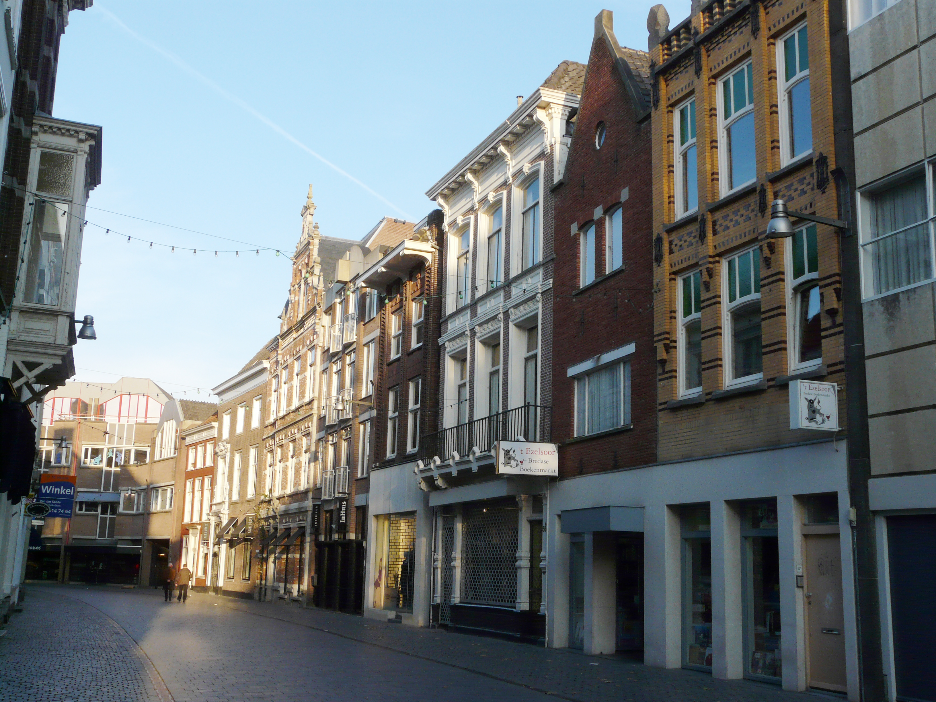 Zicht op een deel van de Veemarktstraat met onder zicht op de boekwinkel 't Ezelsoor gevestigd op de Veemarktstraat 52 gelegen in het centrum van Breda